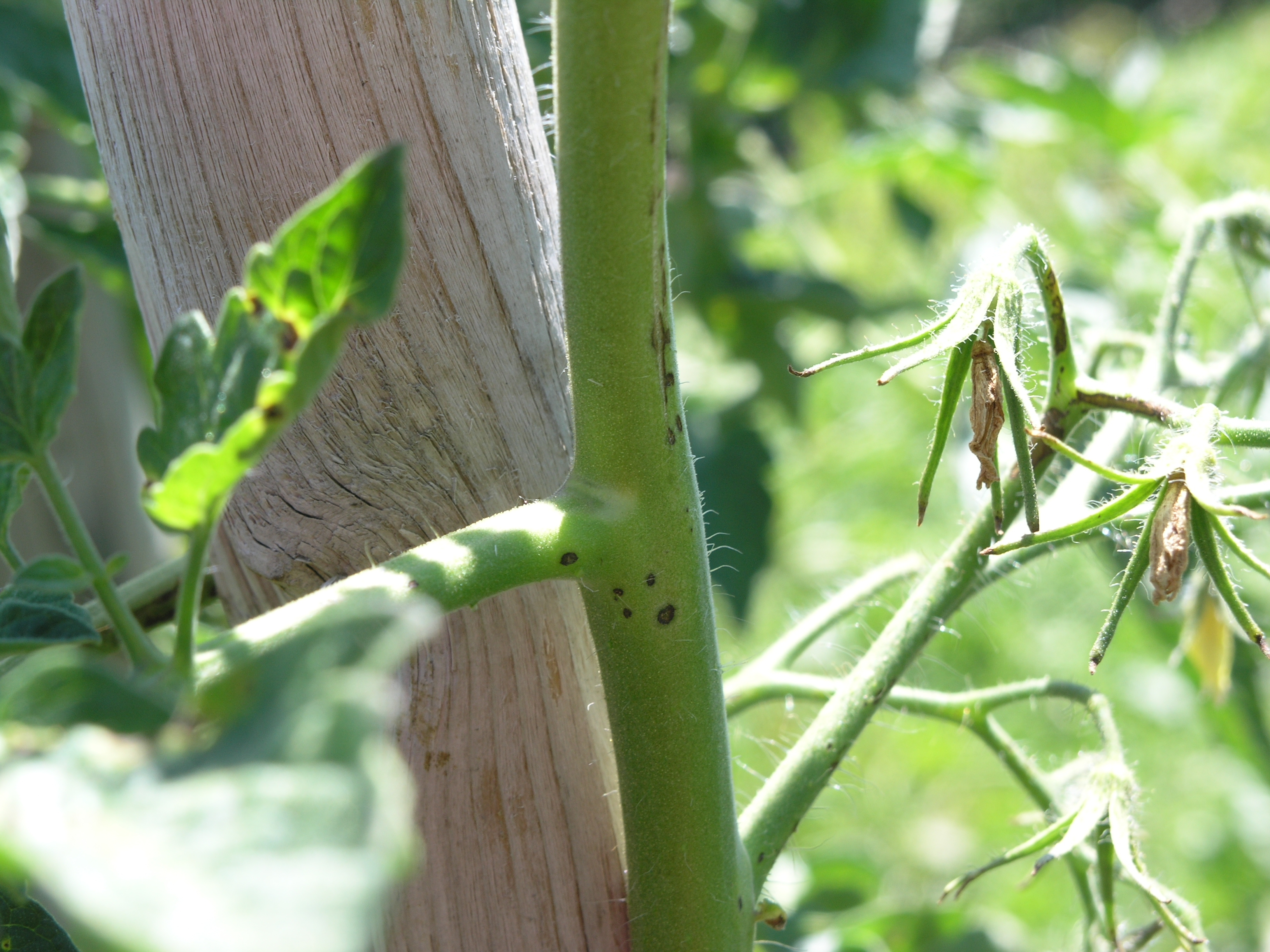 Tomate Spross und Blütenstand mit Flecken von Pseudomonas syringae